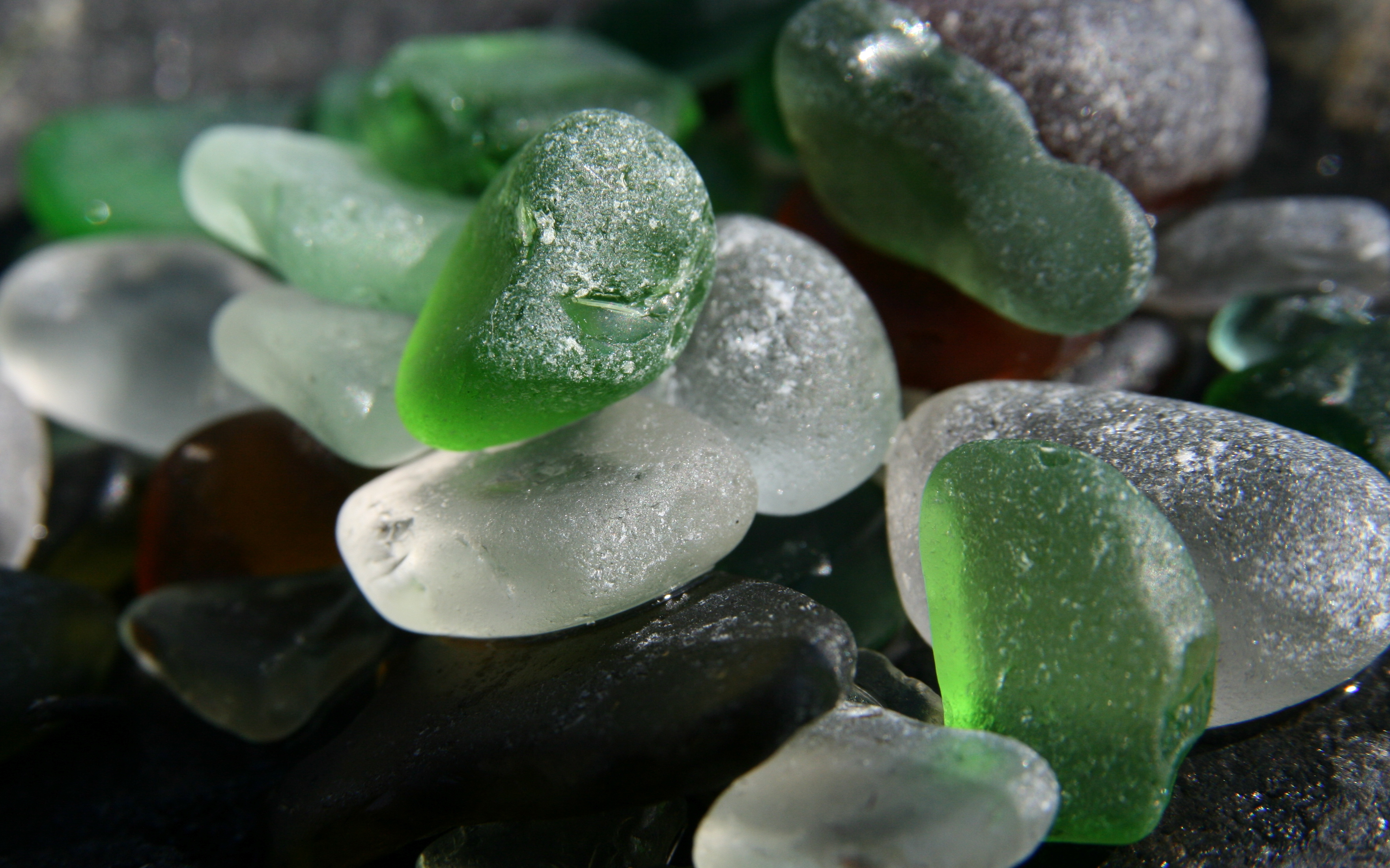 Amanter, stenslipt glass